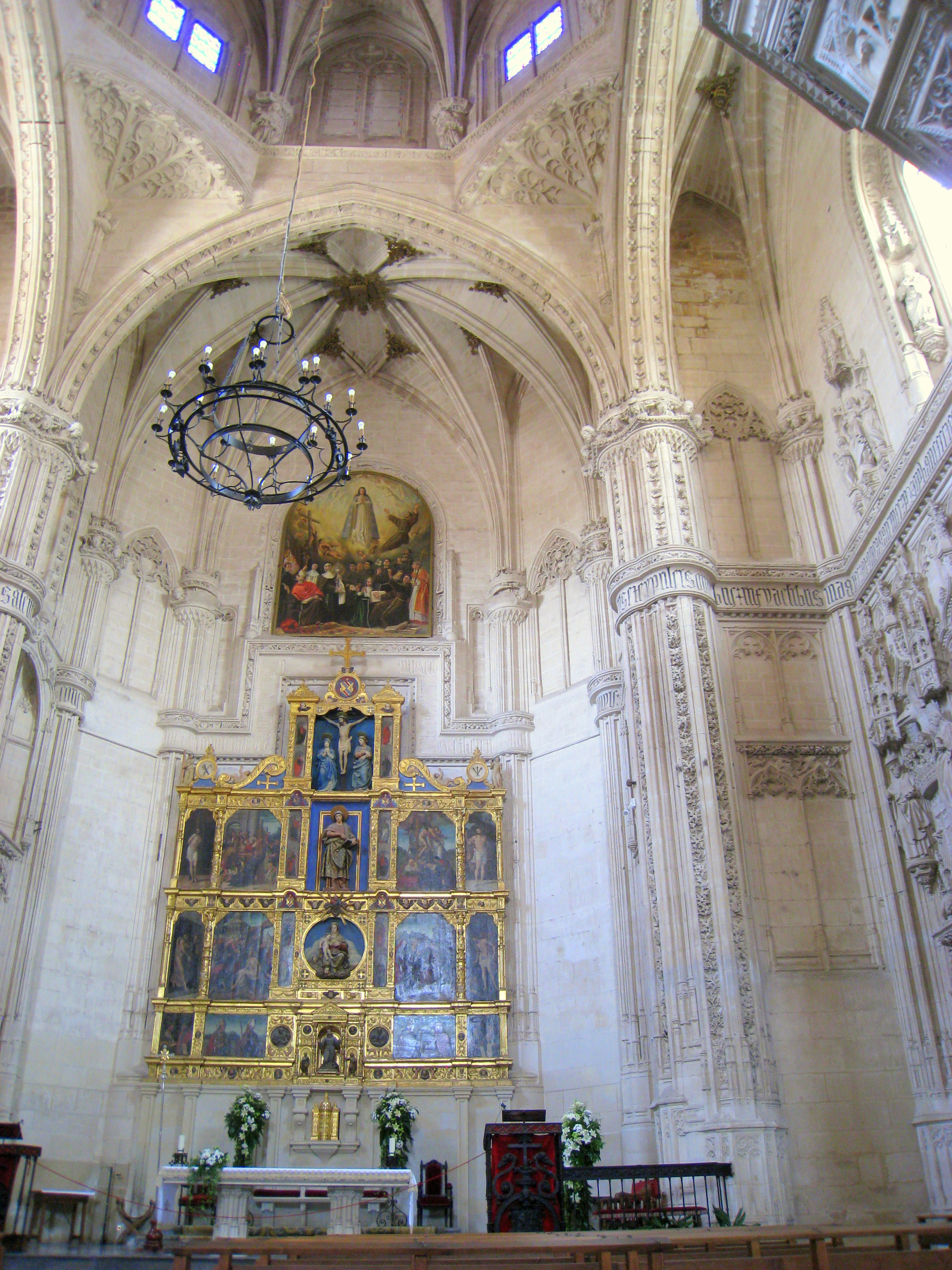 San Juan de los Reyes - Toledo, Spain.